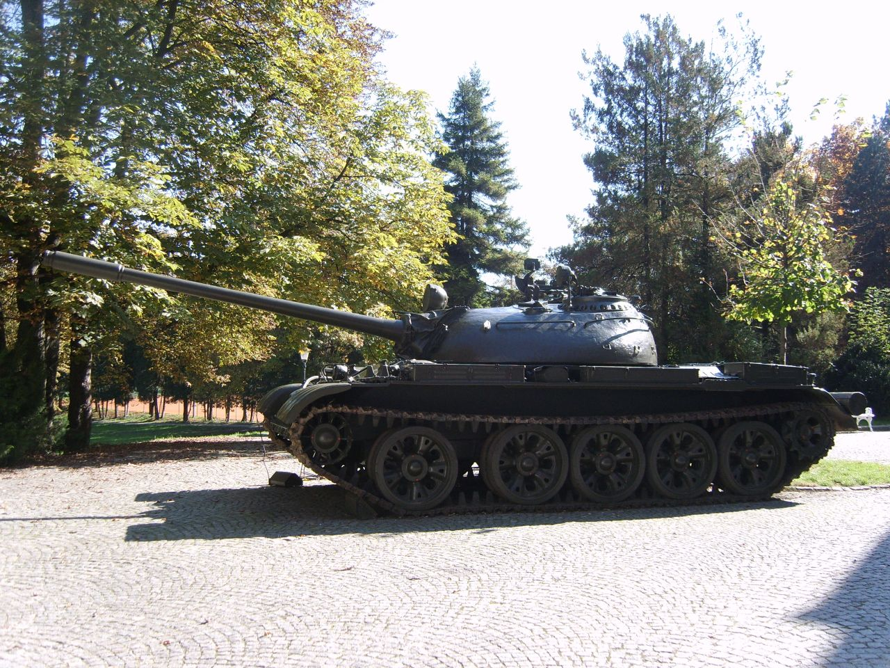 Yugoslav tank